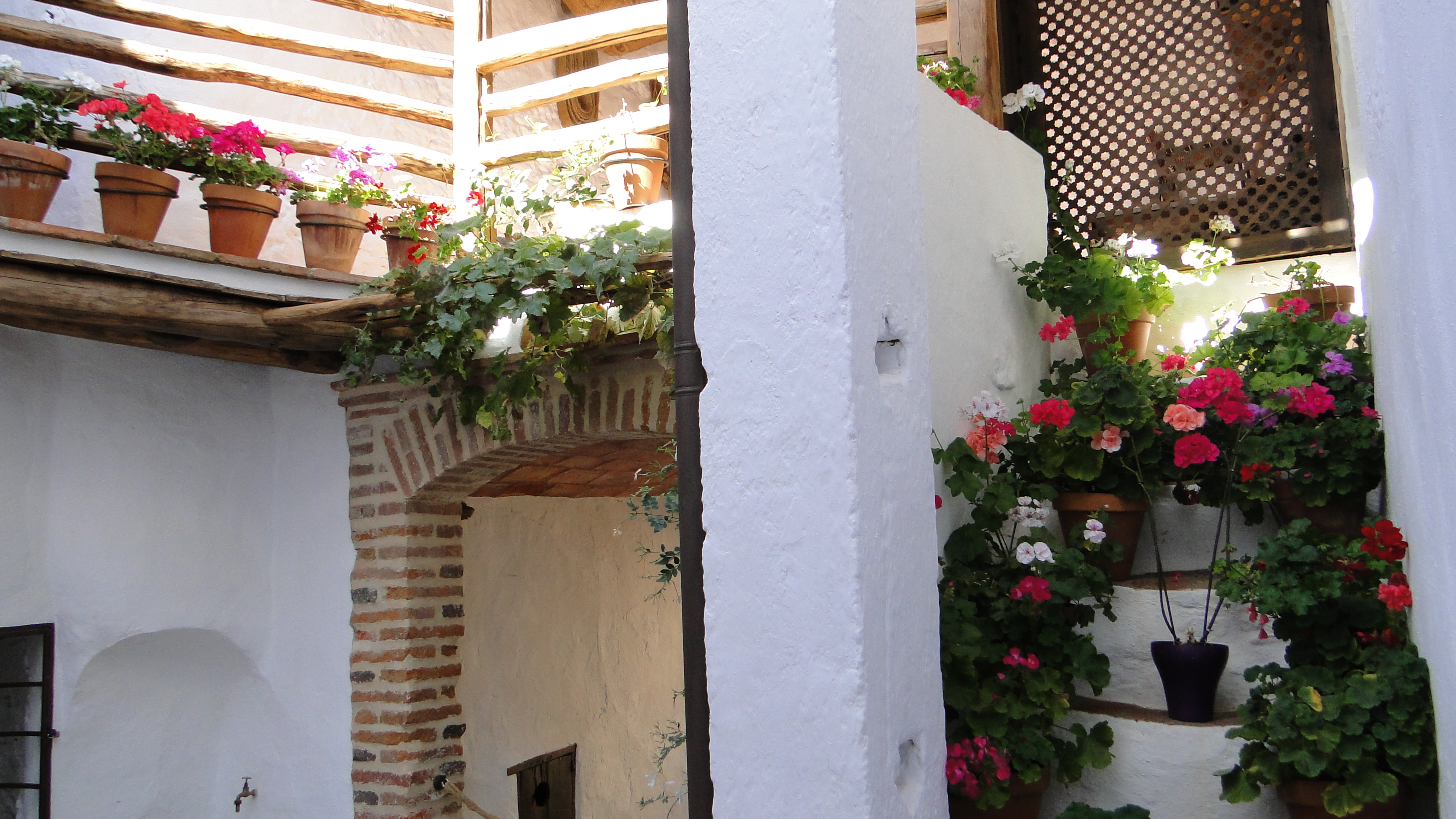 Alpandeire (Málaga), Patio de la casa natal de Fray Leopoldo. Valle del Genal.